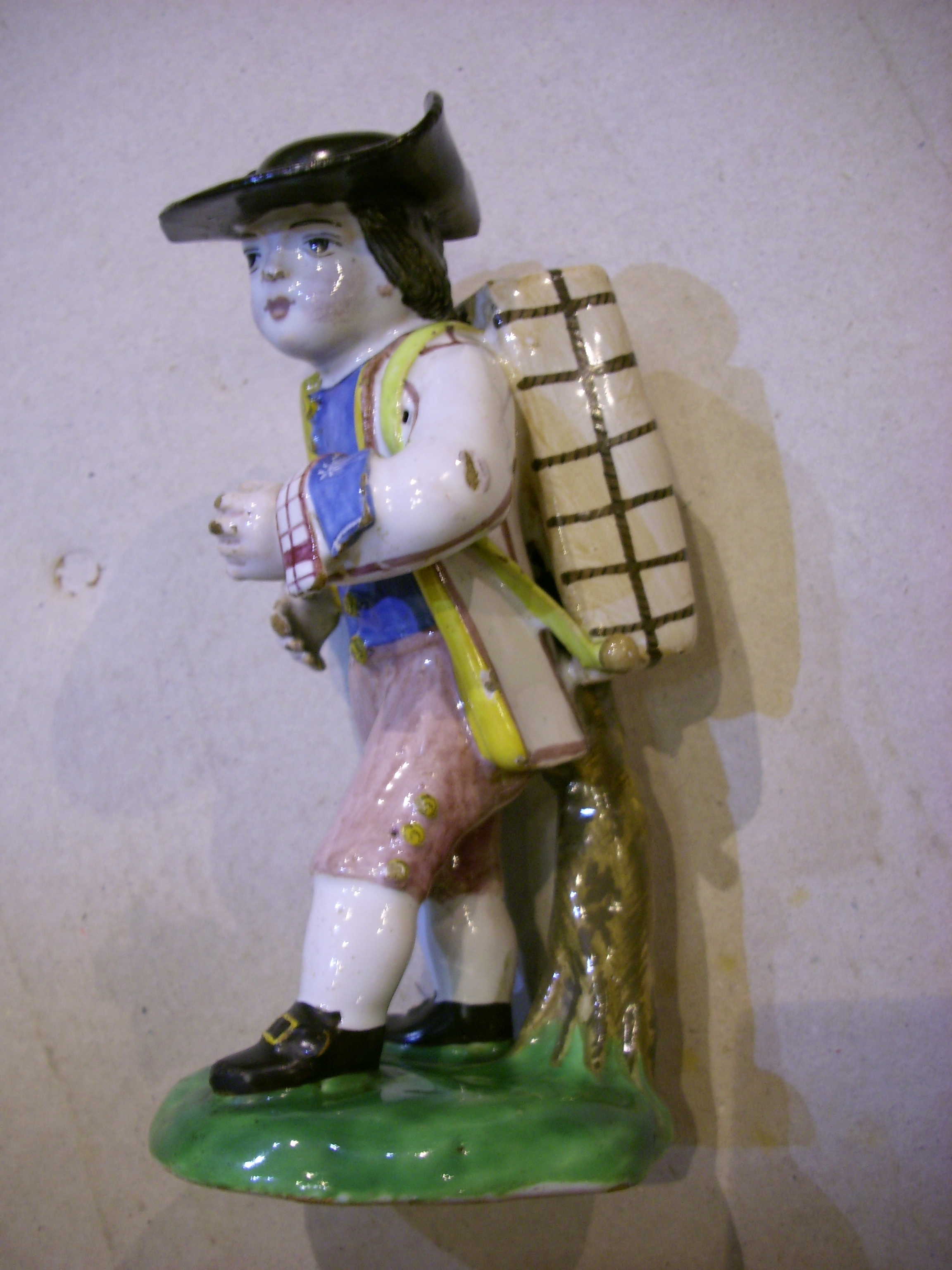 statuette paul hannong polychrome, collection privée, Musée du pain d'épice de Gertwiller